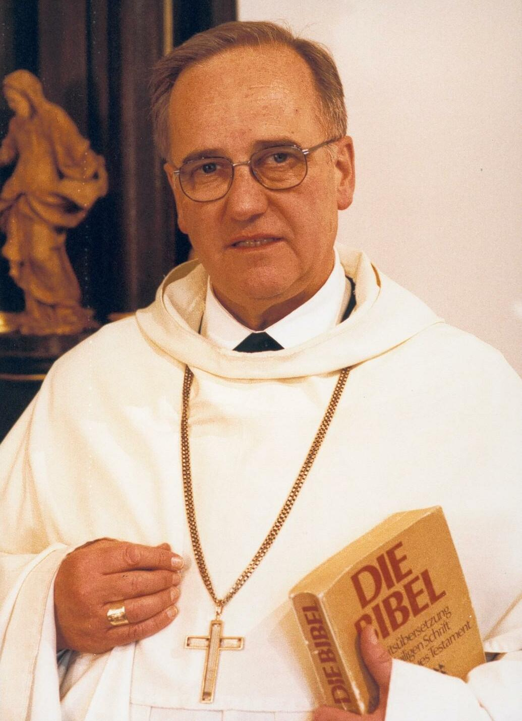 Abt Gregor in der Kukulle mit der Bibel in der Hand.